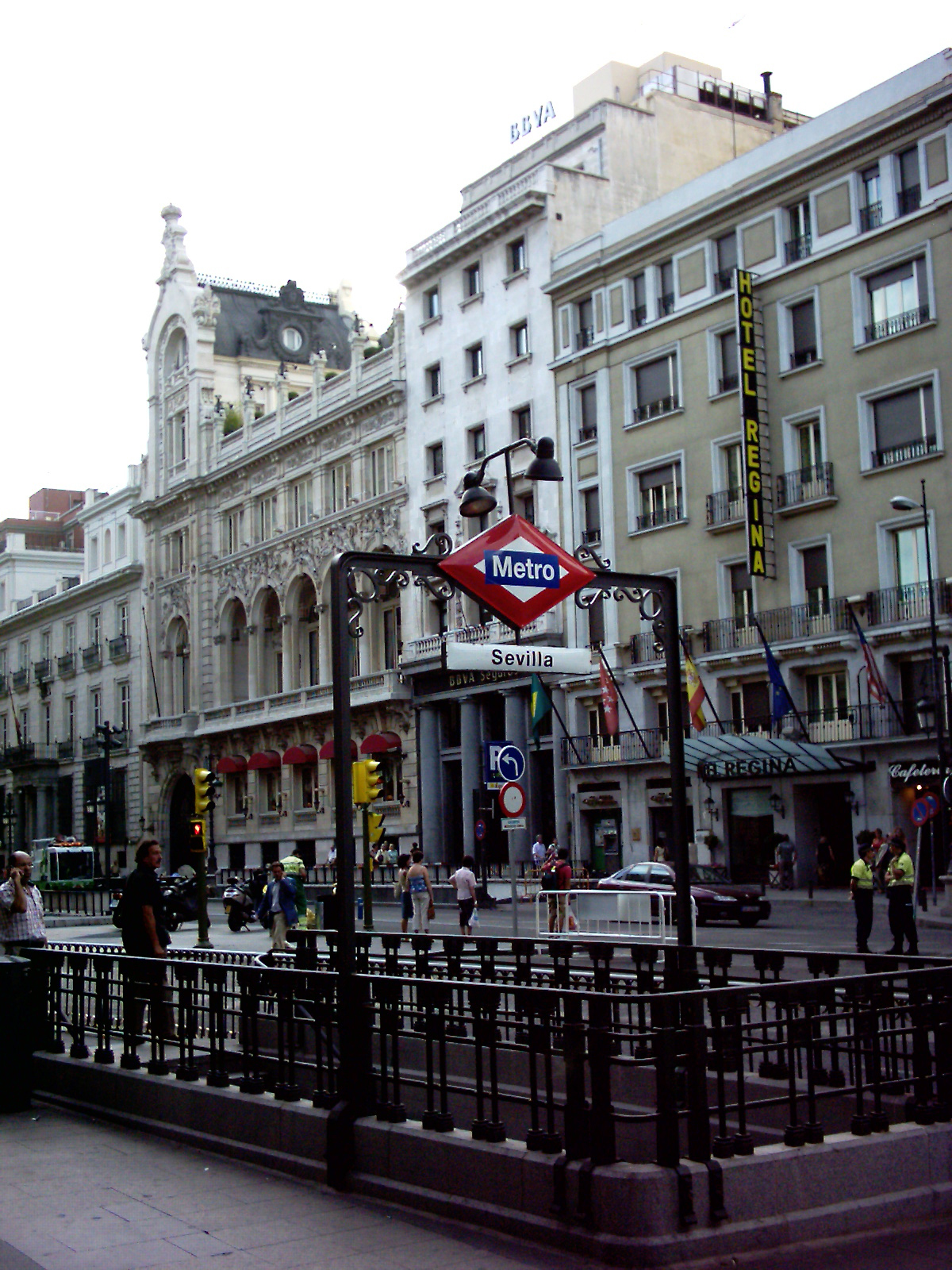 Boca de Metro de Madrid. Arquitecto, Antonio Palacios. Casino de Madrid. Arquitectos: Farge, Esteve y López Salaberry.